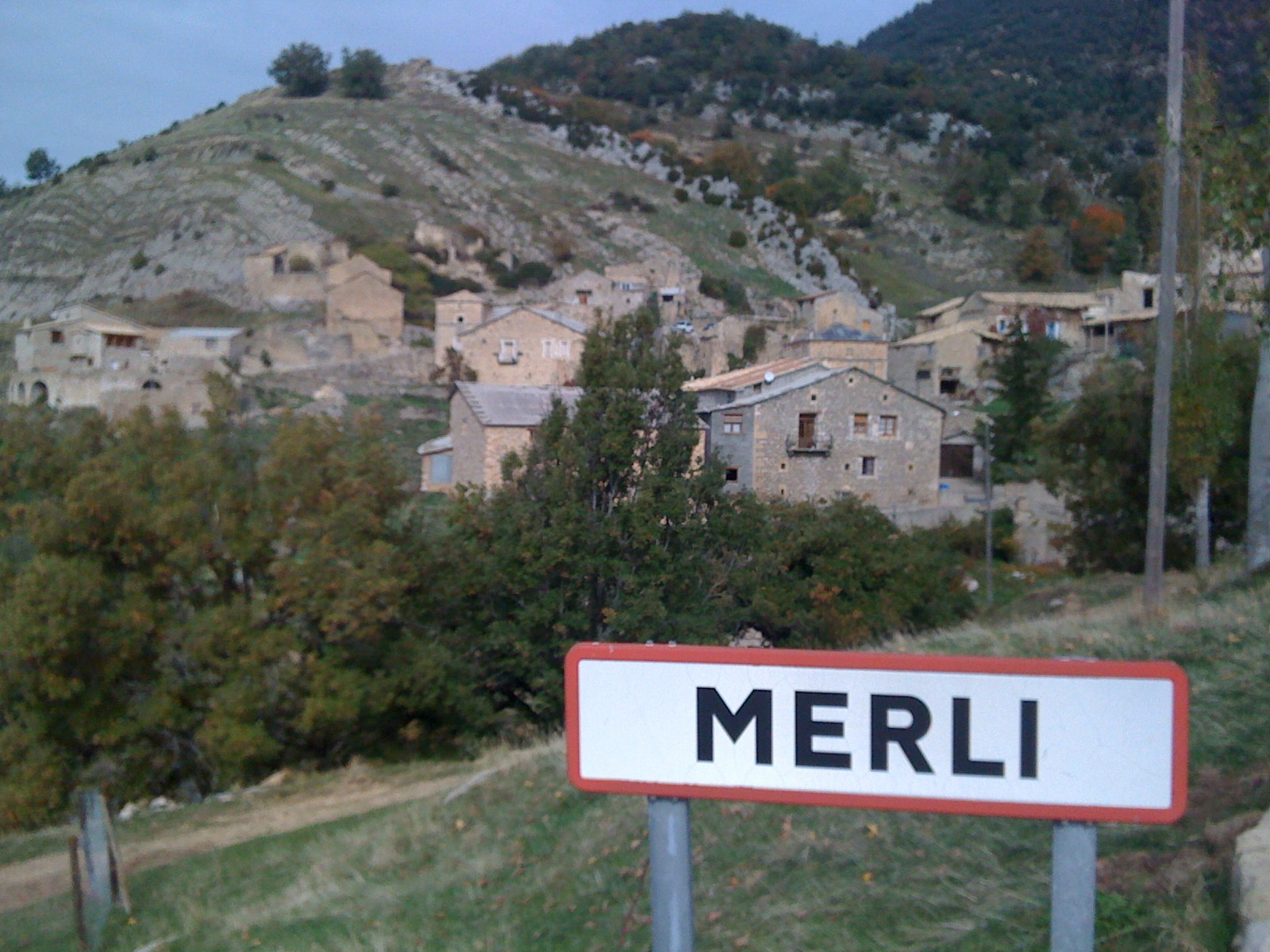 Panorámica de Merli, municipio de la Ribagorza, en el Pirineo aragonés.